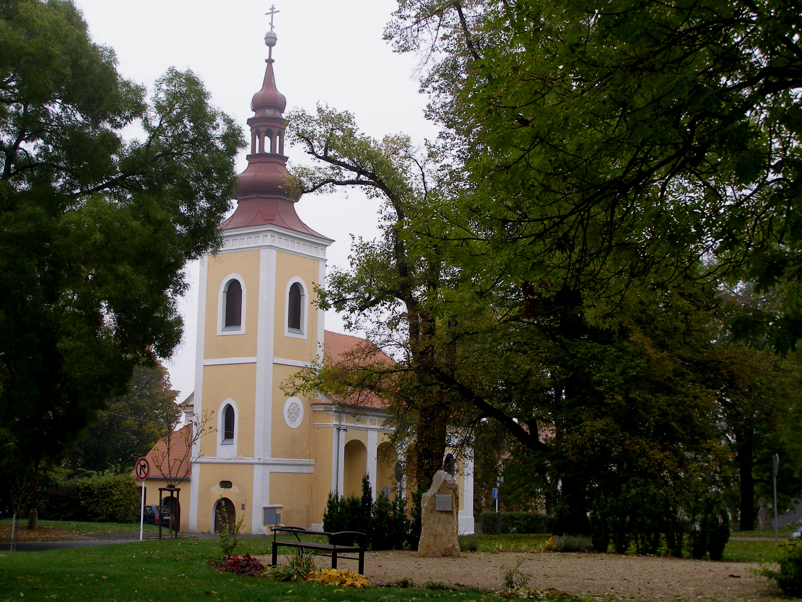 Pohled z Löschnerova náměstí